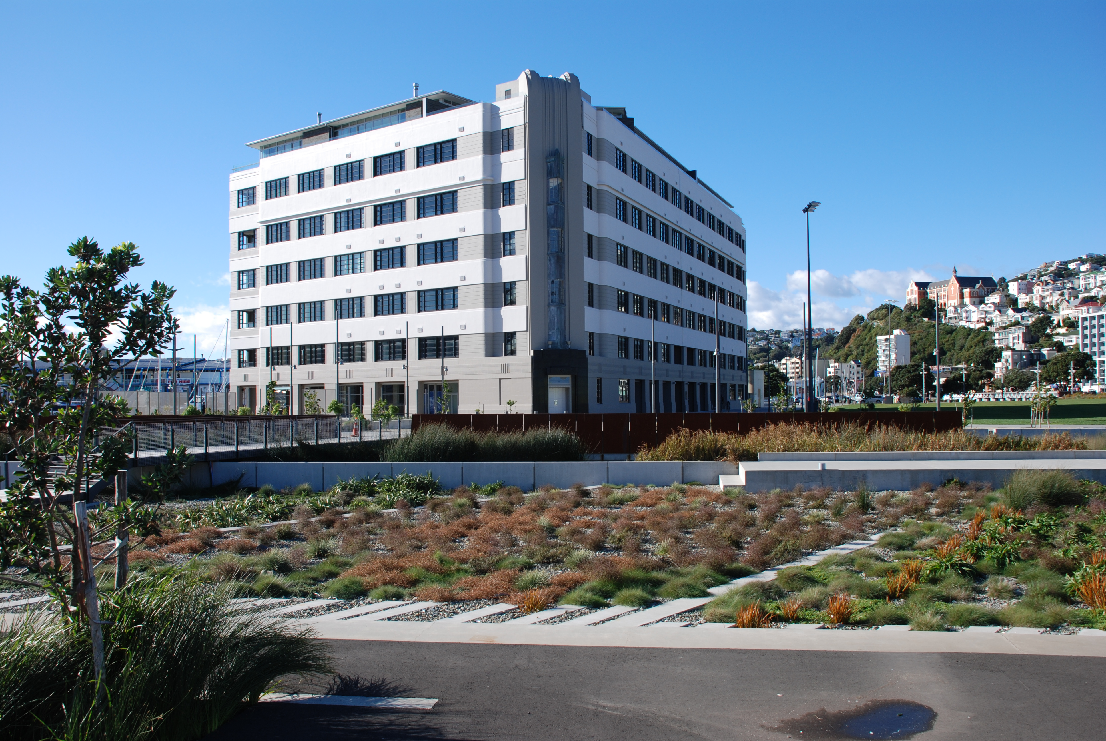 Waitangi Park in June 2007